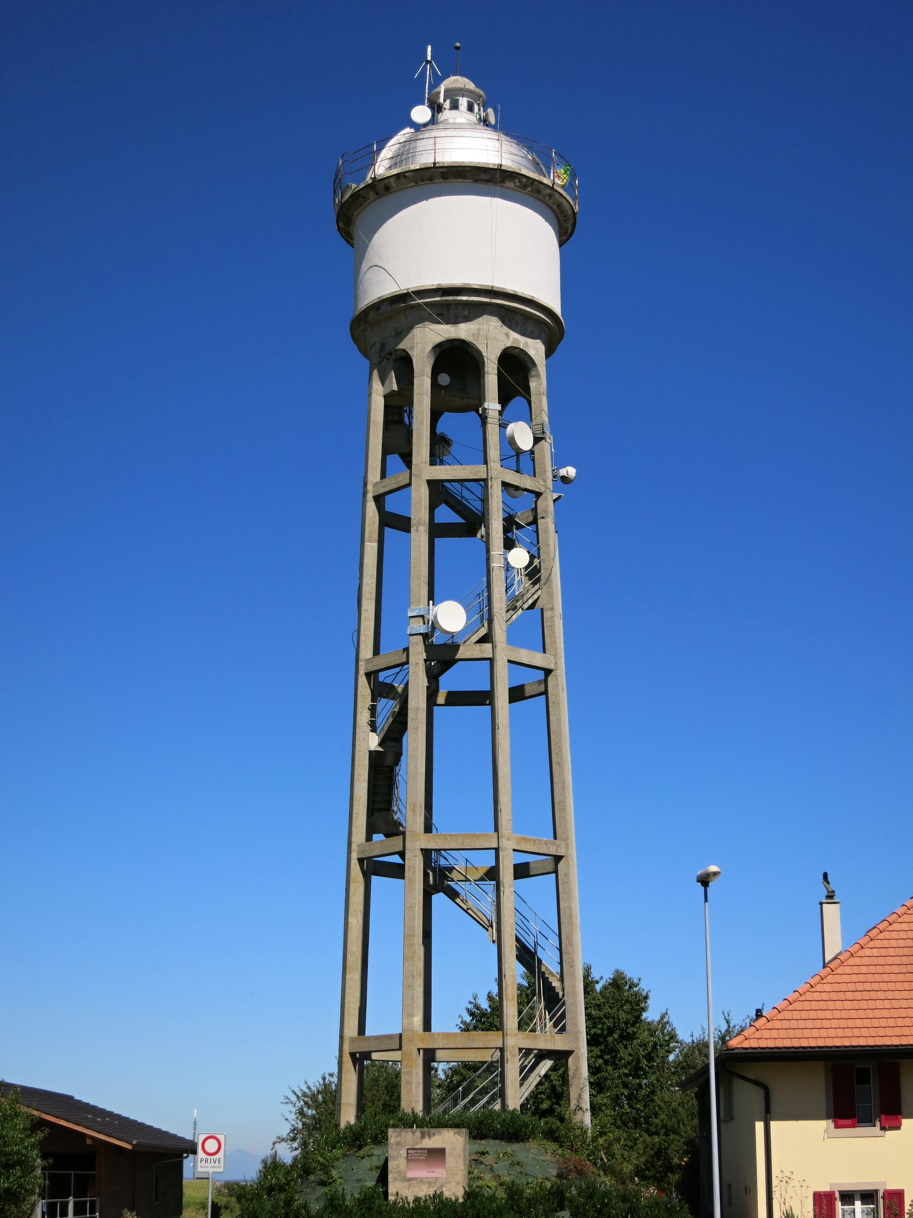 Château d'eau de Montmagny